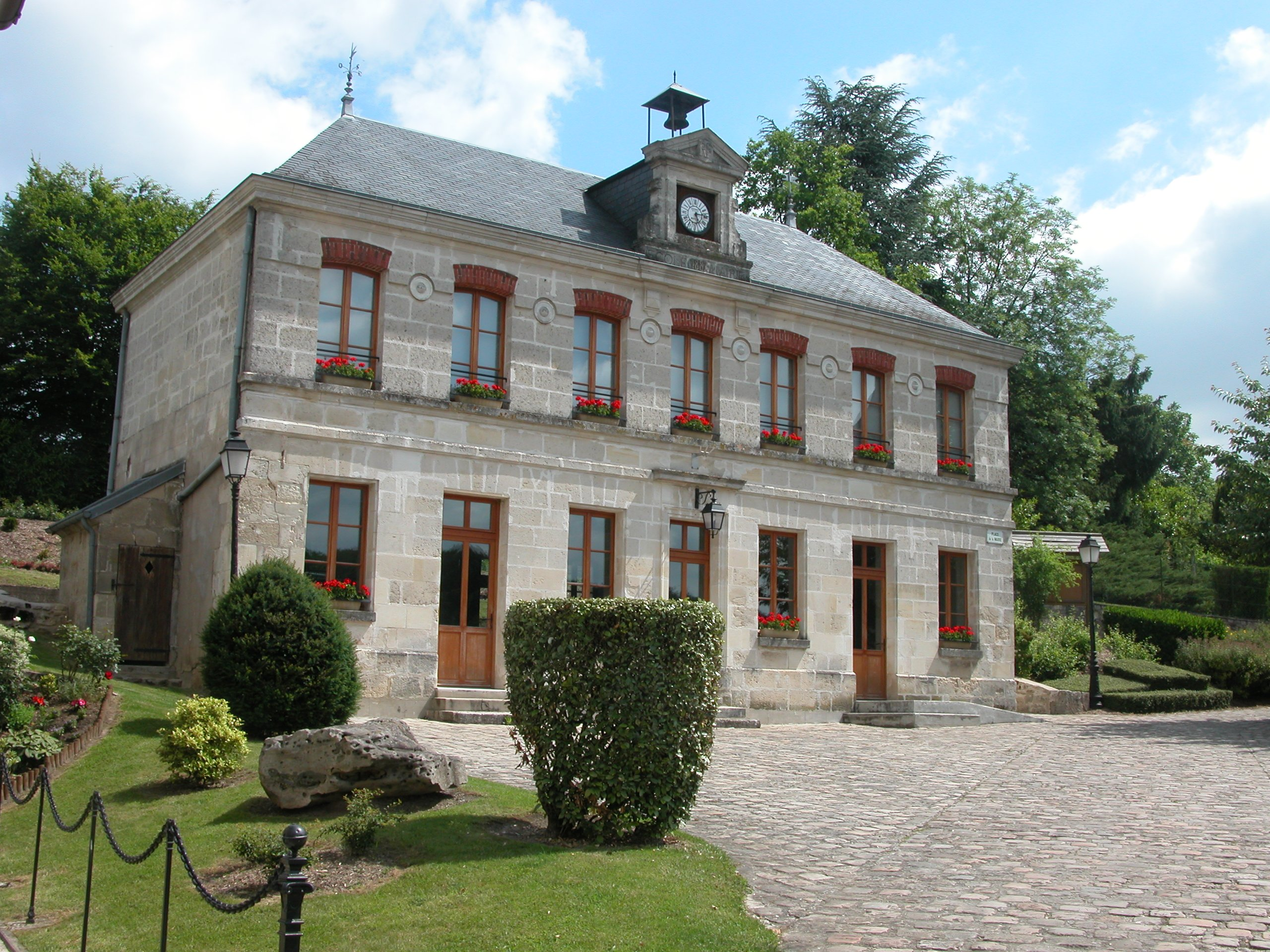 Mairie école peut-être bâtie dans le 1er quart du 19e siècle, consistant alors en un rez-de-chaussée ; en 1884, projet de construction d'un étage ; le conseil municipal confie les travaux à Pottier, architecte à Villers-Cotterêts, le gros-oeuvre est terminé en 1887